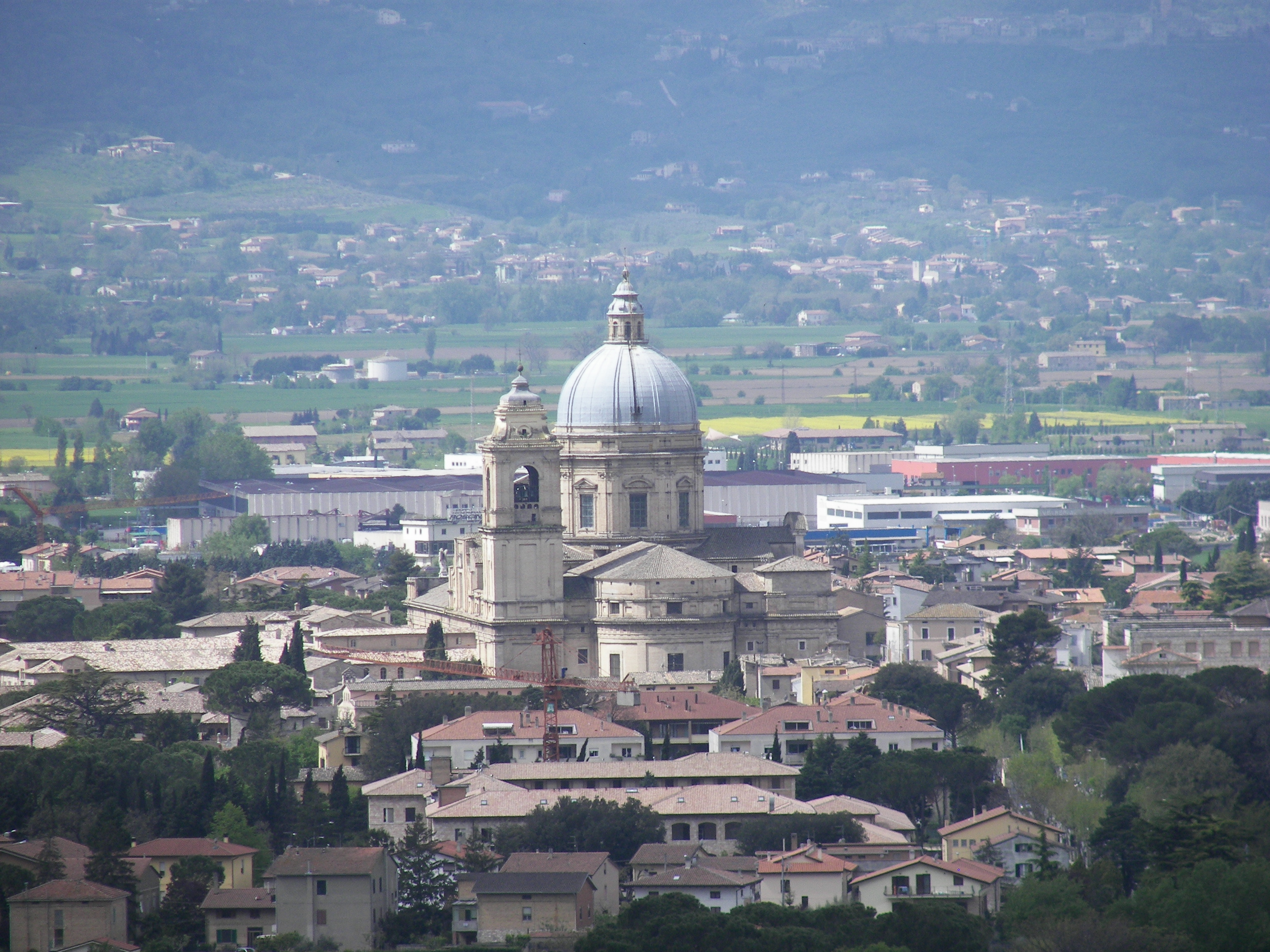 Basilica of Santa Maria degli Angeli Native nameBasilica di Santa Maria degli AngeliParent institutionBasilique de Santa Maria degli Angeli et le Palais des Capitaines du Pardon LocationAssisi, Umbria, ItalyCoordinates43° 03′ 30″ N, 12° 34′ 50″ E Established1684Web page Authority control : Q4706745 VIAF: 156014587 LCCN: n85327587 GND: 4426703-4 WorldCat institution QS:P195,Q4706745